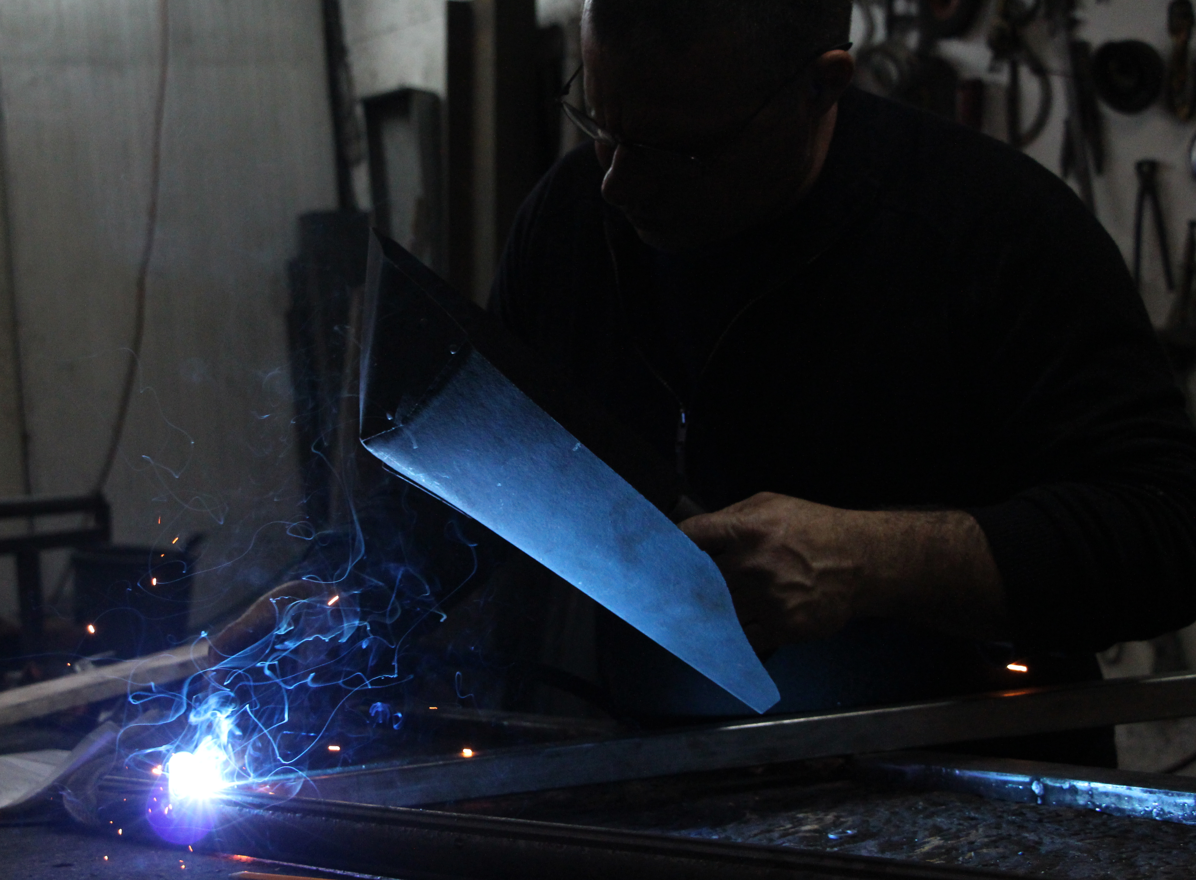 רתח שוקי חיו צילום תיכון רוטברג